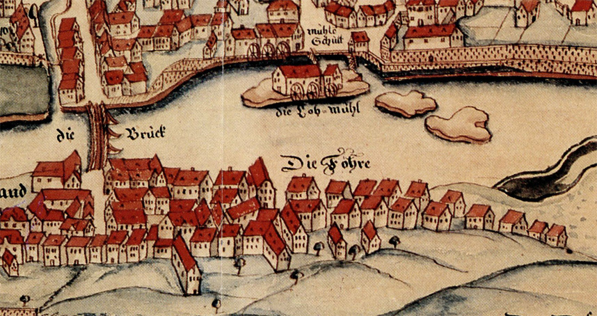 Ansicht der Fuhr auf einer Elberfelder Stadtansicht von 1771